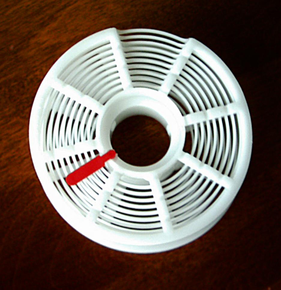 Jobo Dueset 16mm/110 development reel Jobo 16毫米/110 螺旋卷盘 唐戈摄影 2006